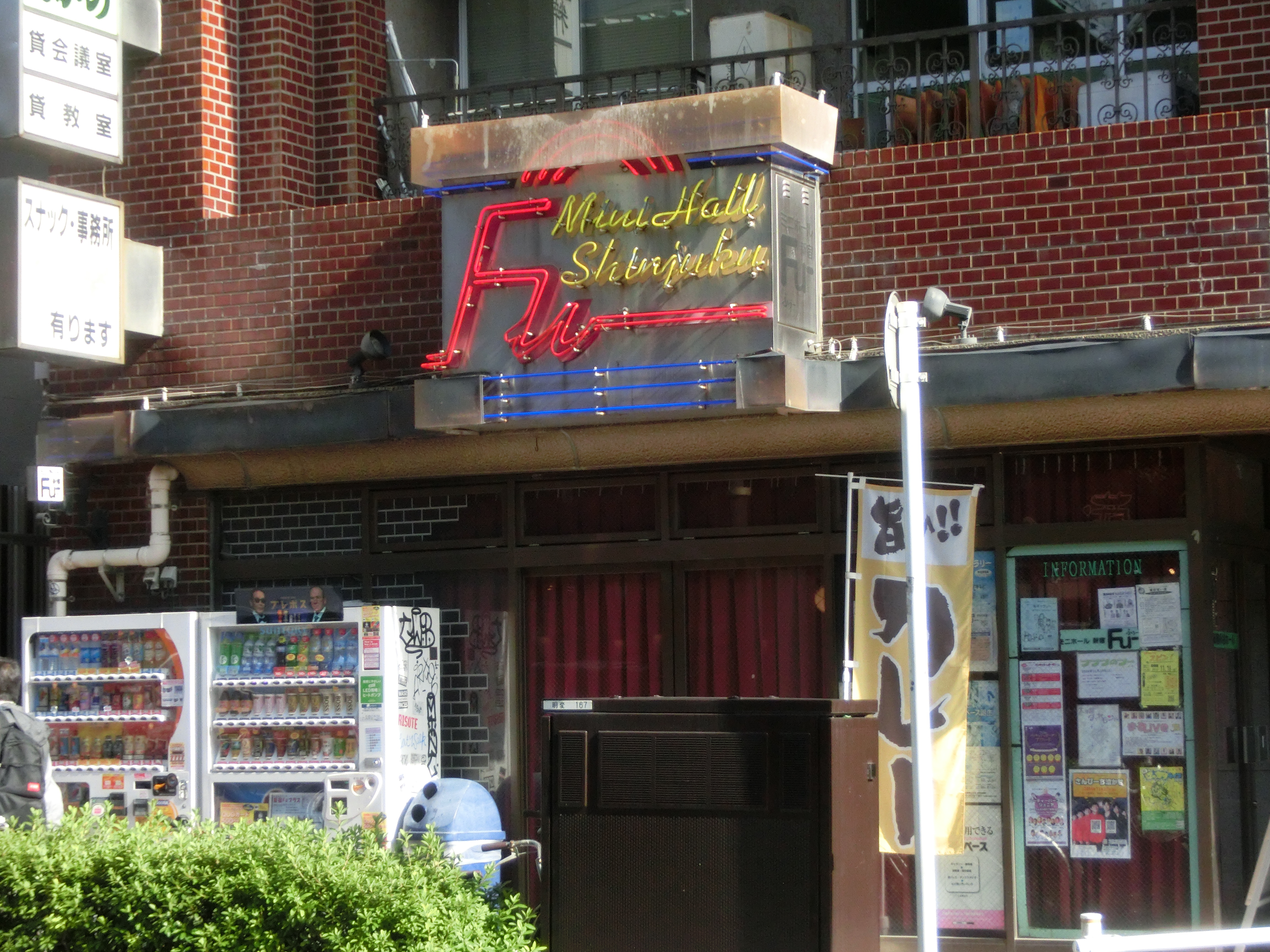 shinjuku nagatani fu